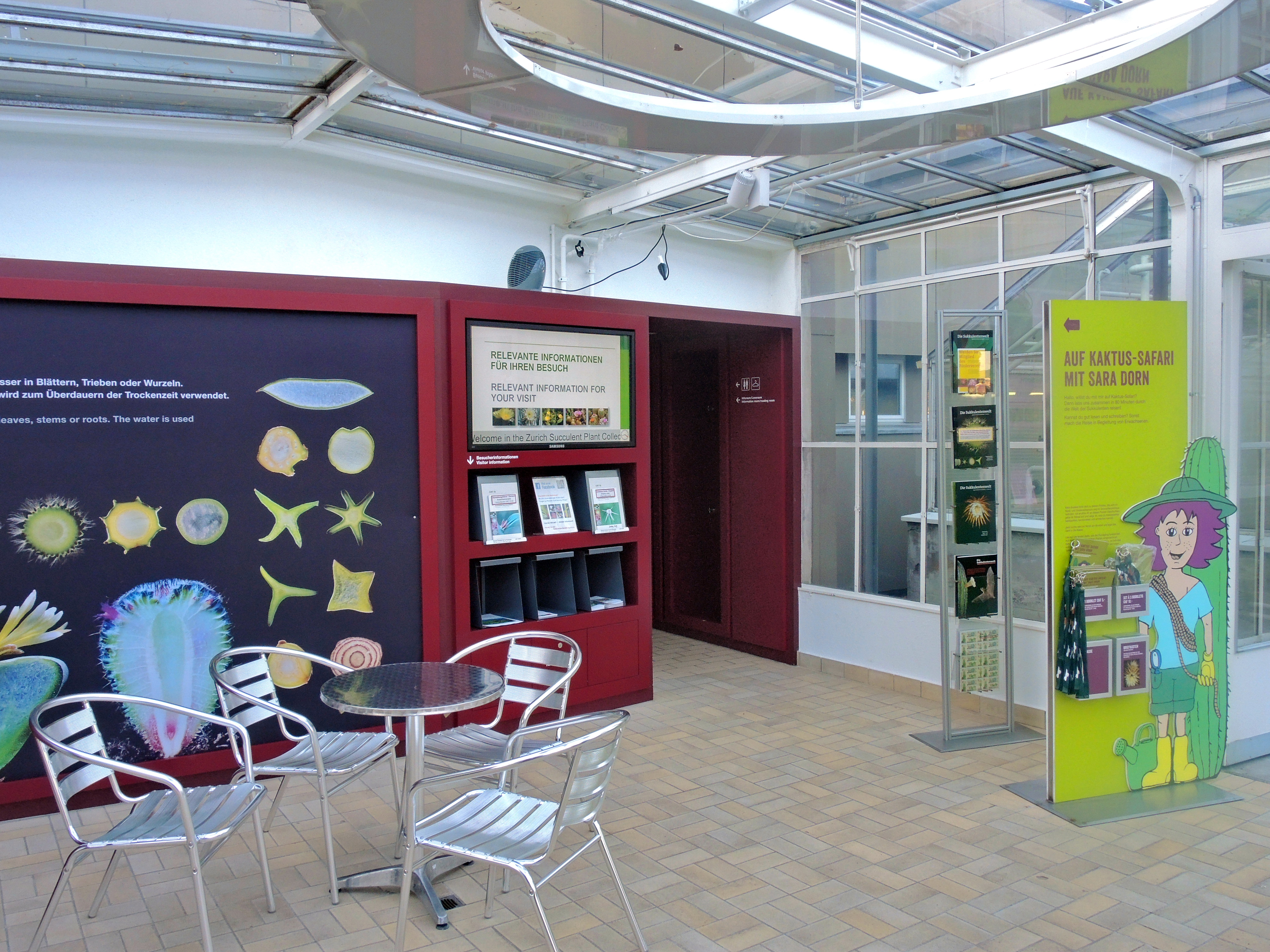 Sukkulenten-Sammlung Zürich, Mythenquai in Zürich